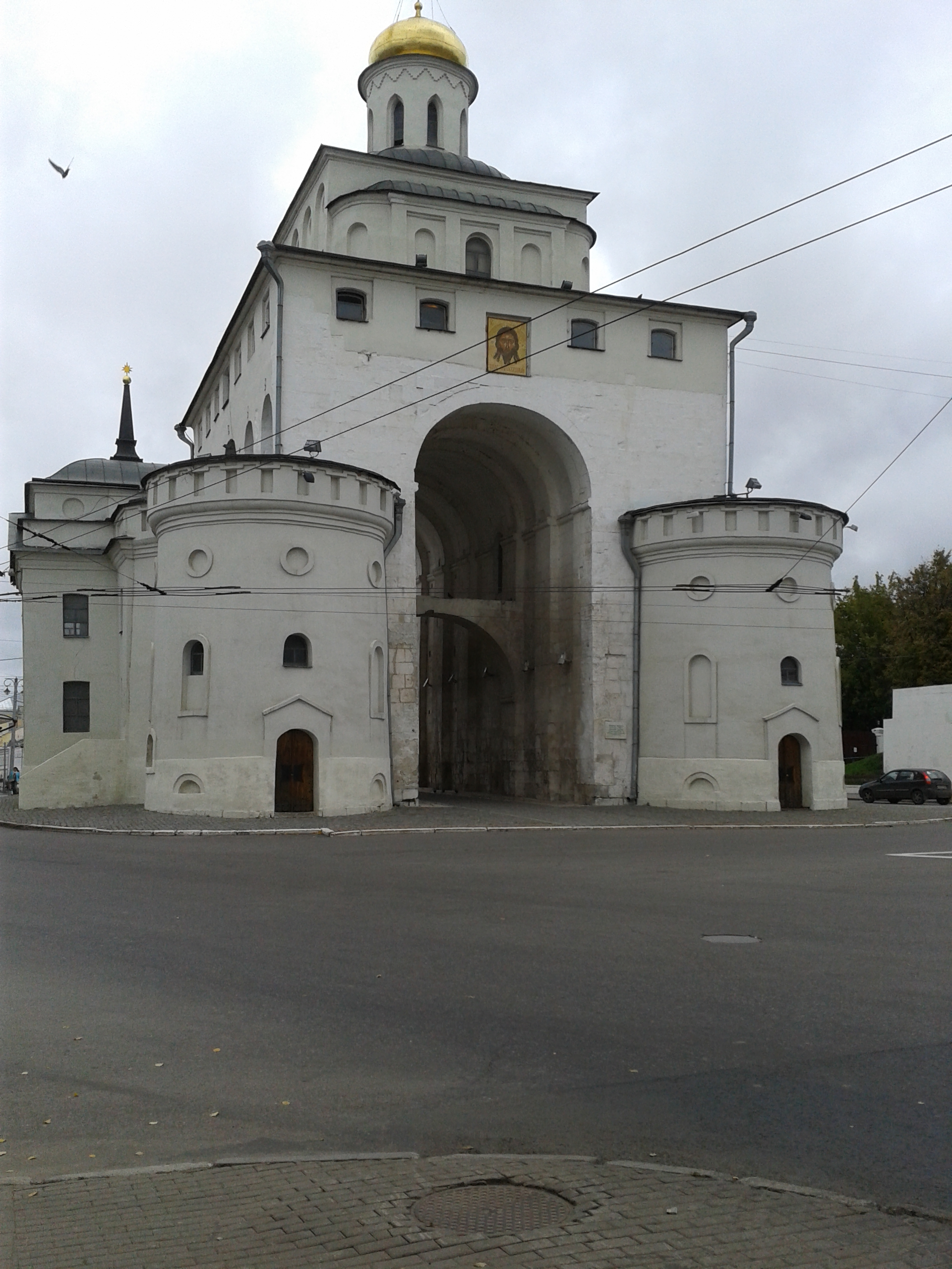 Золотые ворота в городе Владимир